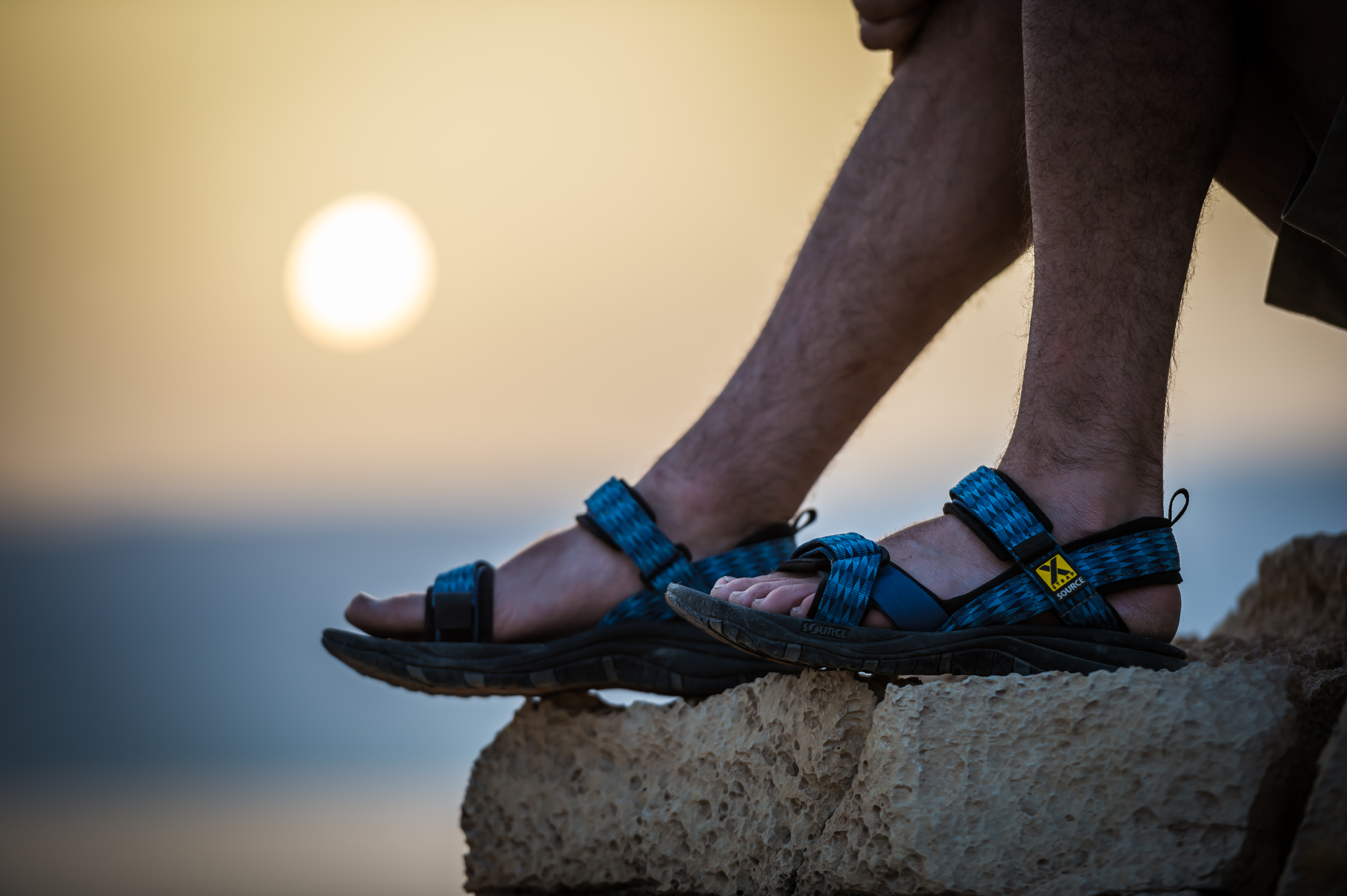 סנדלים של חברת שורש